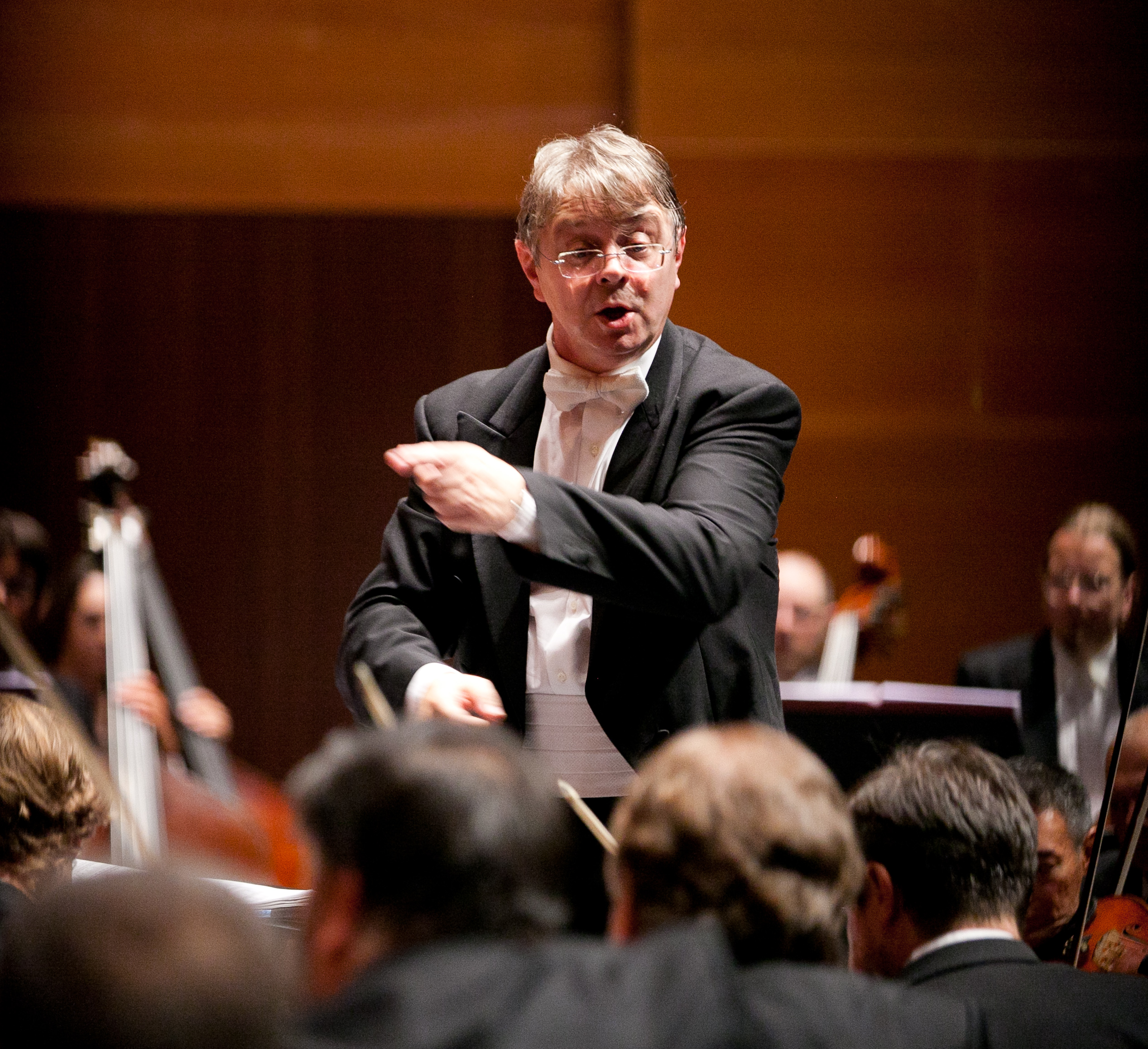 Orquesta Sinfónica de Galicia-Ainhoa Arteta